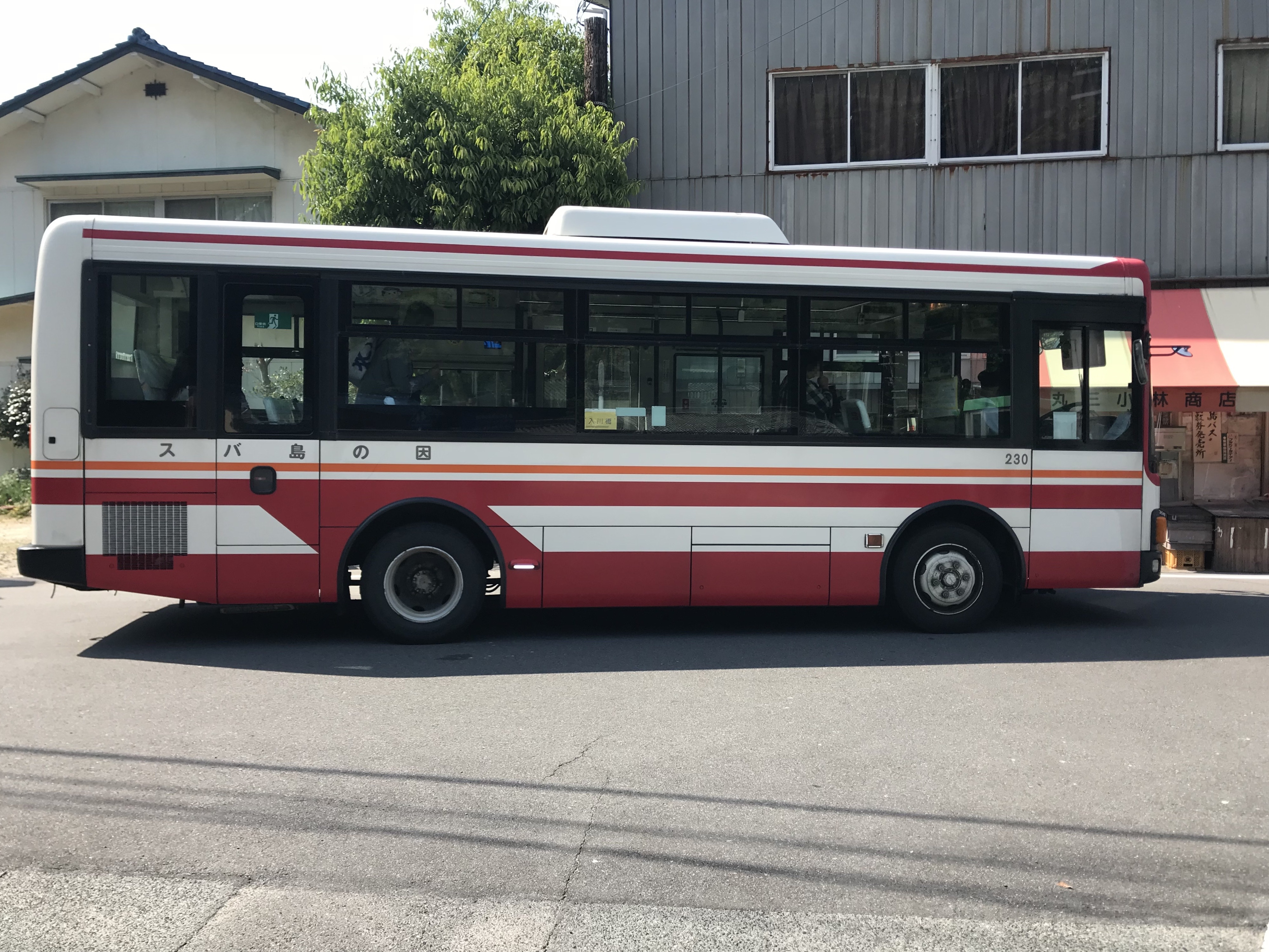 入川橋バス停に停車する因の島バス